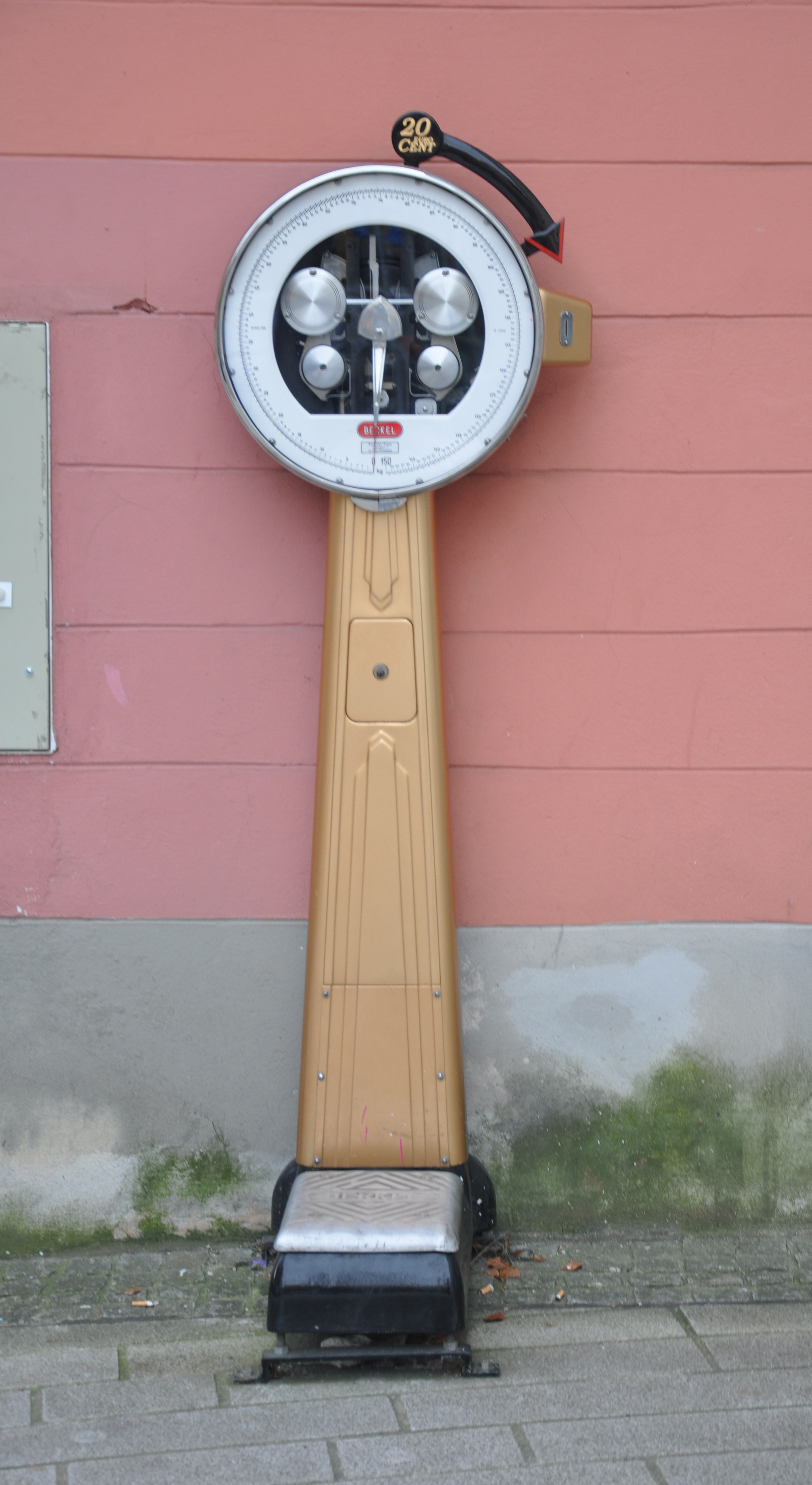 Linz, Öffentliche Waage (Marke: Berkel-Waagen) in der Altstadt